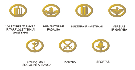 подвески к знакам ордена За заслуги перед Литвой